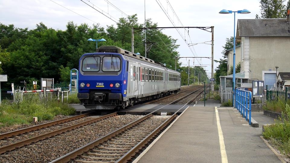 L'automotrice Z 7362 entre en gare de Theillay (41) le 19 juillet 2017.